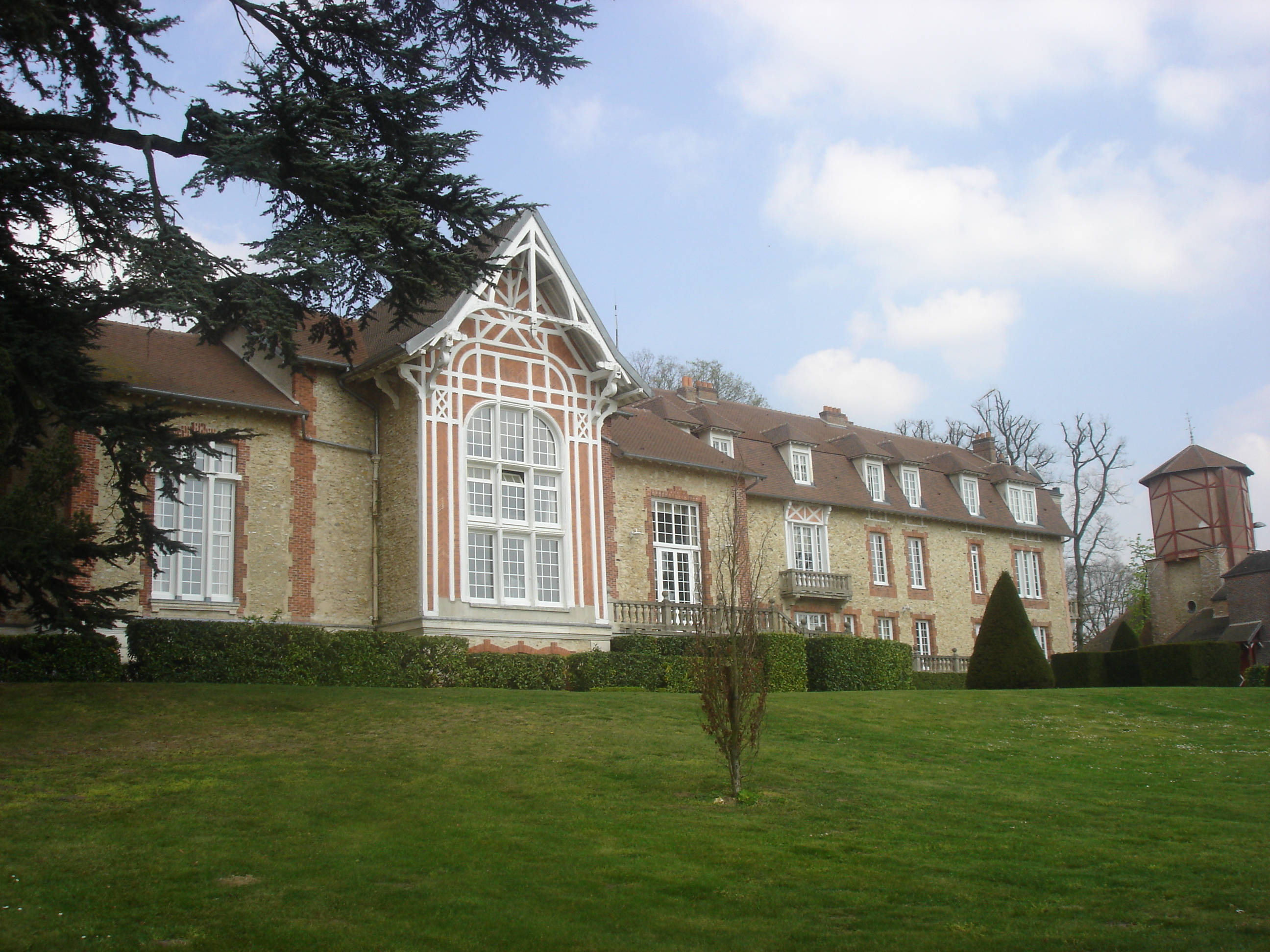 Le château de Montjoye à Clairefontaine-en-Yvelines, est la propriété de Lord Henry Noailles Widdrington Standish of Standish et son épouse Lady Hélène de Pérusse des Cars, de 1894 à 1920. Aujourd'hui, le domaine appartient à la Fédération française de football, sous le nom de Centre technique national Fernand-Sastre.